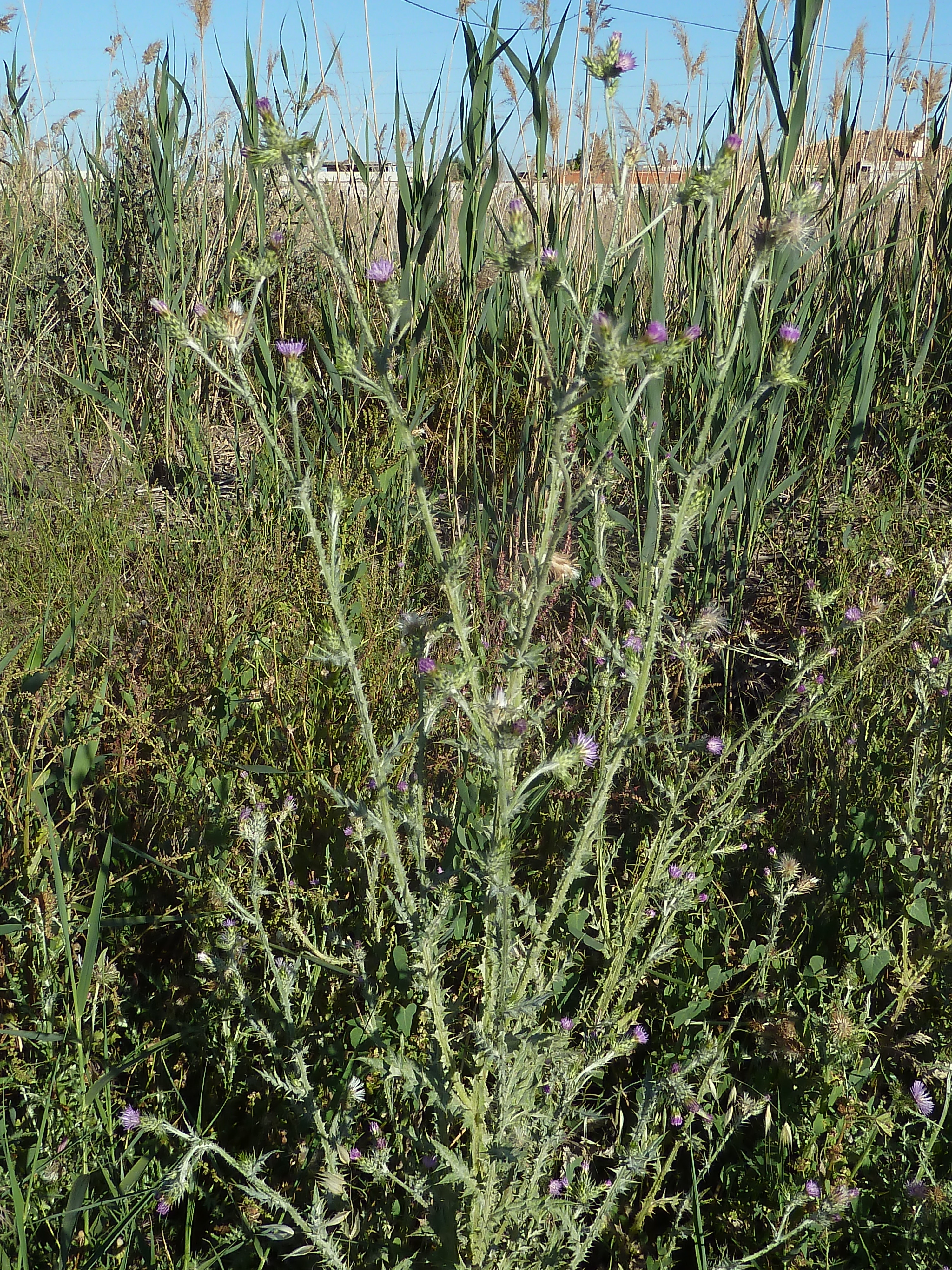 Carduus pycnocephalus (cardo, cardo borriquero, cardo negro) - Vista general en antesis de un individuo abundantemente ramificado. - Camino de la Azarbe de Patricio, Albatera (Ptovincia de Alicante, España).